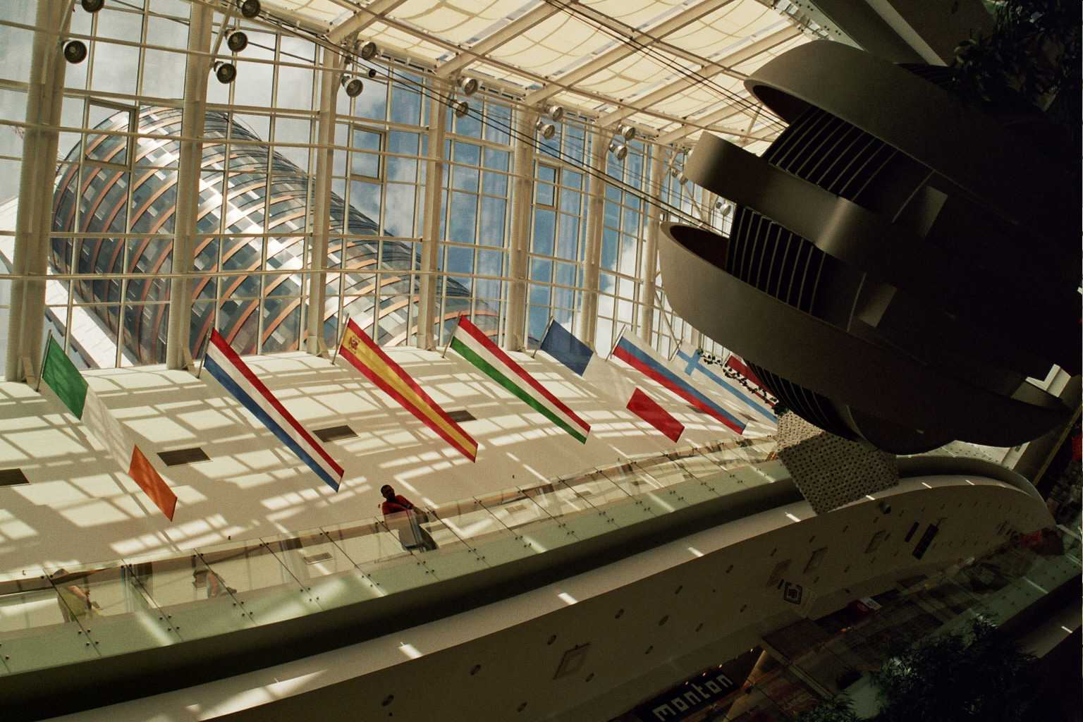 Moderna komerca centro de Vilno